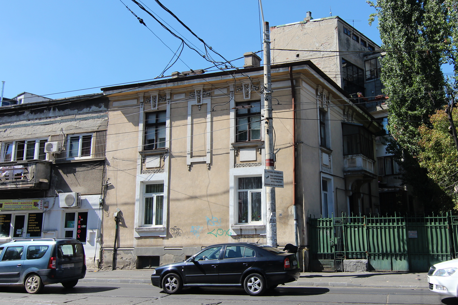 Casă pe strada Traian